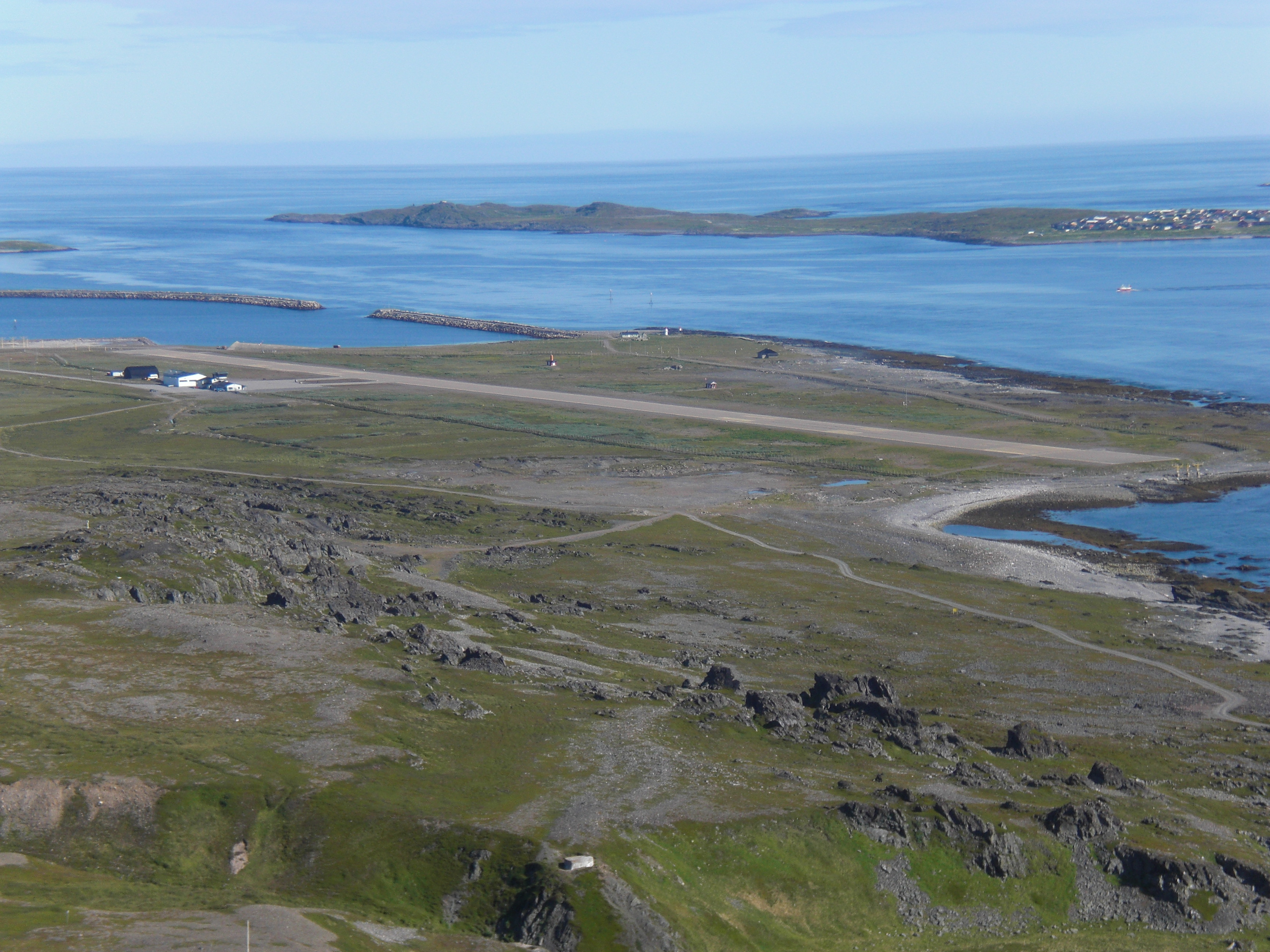 Oversiktsbilde over Vardø lufthavn, Svartnes